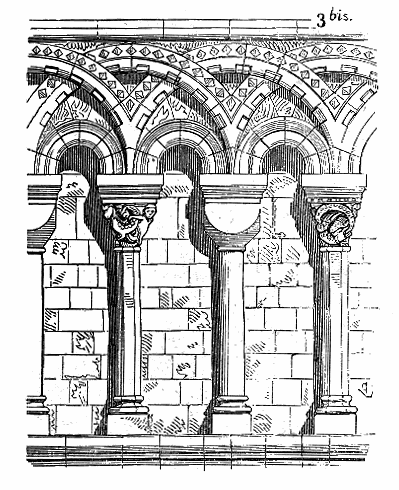 Dessin d'une arcature de la cathédrale de Canterbury